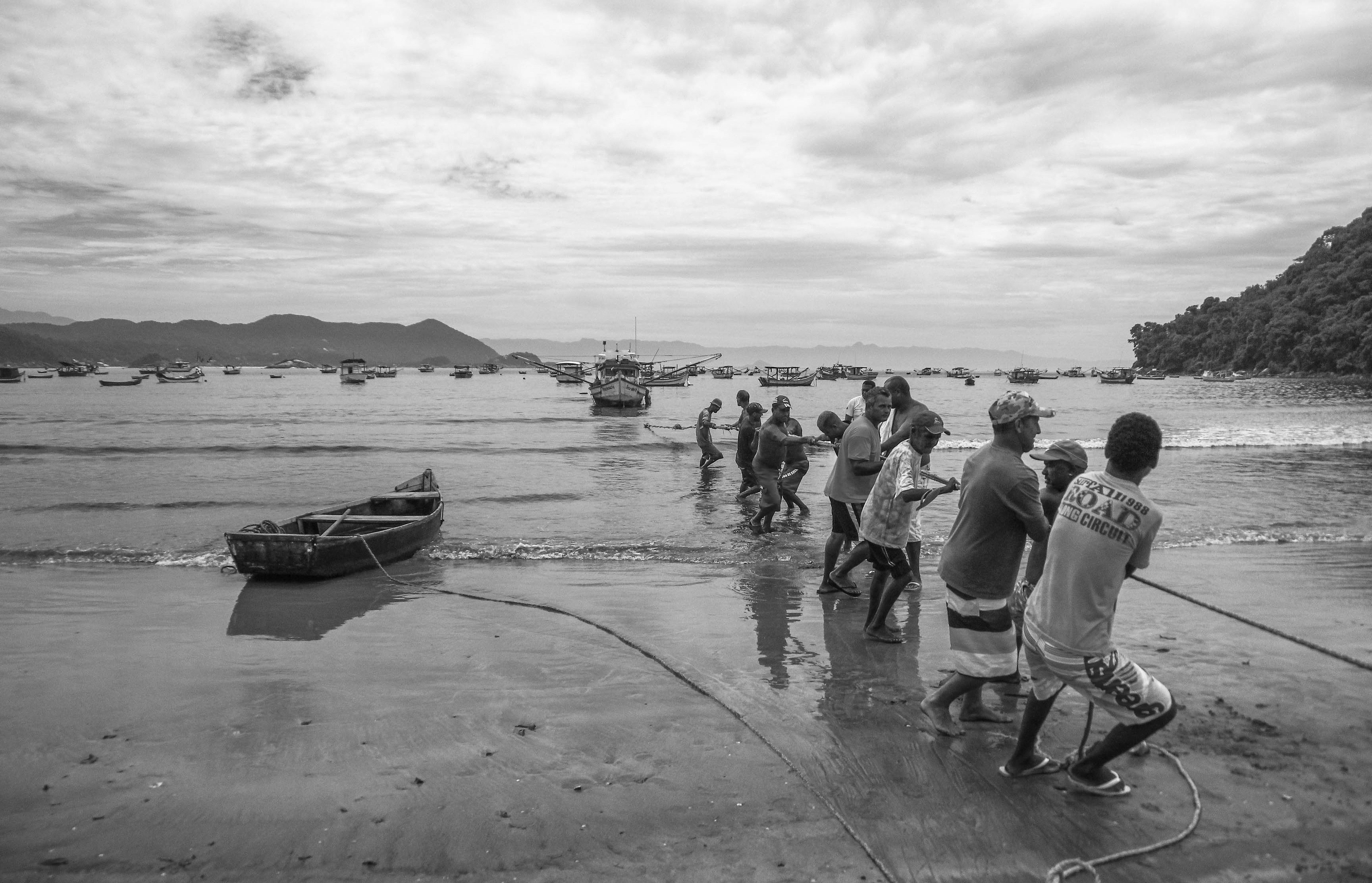 Praia de pescadores,caiçaras,do Pereque,Guaruja litoral norte do estado de Sao Paulo,Brasil.